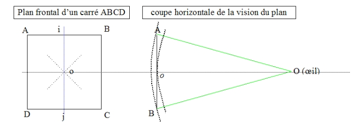 perspective visuelle par lyonart- graphe3 courbure du champ